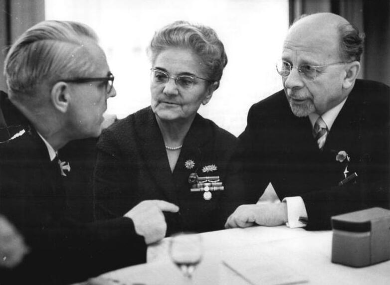 Zentralbild Kohls hsch 9.3.67 Berlin: Walter Ulbricht gab festlichen Empfang. V.l.n.r.: Willi Stoph, Vorsitzender des Ministerrats der DDR, Frau Lotte Ulbricht und Walter Ulbricht, Vorsitzender des Staatsrates der DDR im Gespräch während des Empfangs, den der Staatsratsvorsitzende für verdiente Frauen am 8.3.67 anläßlich des 20. Gründungstages des DFD und des Internationalen Frauentages im Staatsratsgebäude gab.